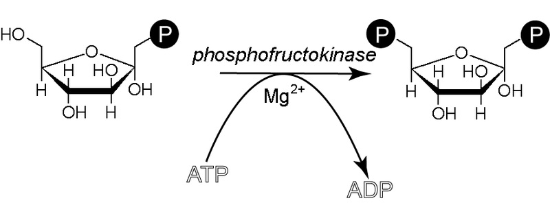 Synthèse de fructose-1,6-diphosphate.